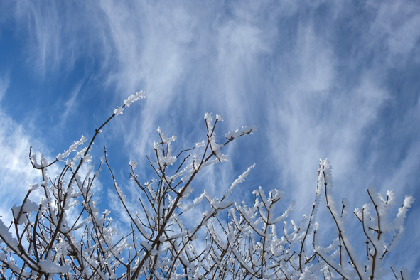 Beispiel für eine freie Arbeit des Fotografen Axel Nickolaus Entstanden im Winter 2018 in Friedrichsbrunn.